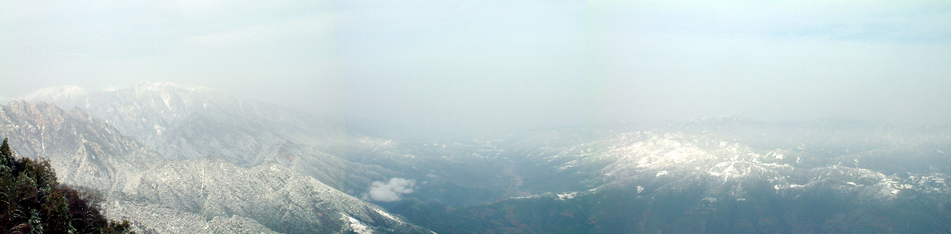 太白群山-自2300米处菩萨大殿拍摄-3张拼 过智俊 摄于2004年5月3日 版权所有（见下）